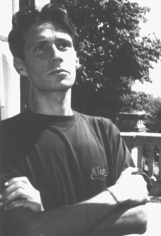 Andrea Bormida, disegnatore di fumetti per la Bonelli Editore (Nathan Never e Legs Weaver). Foto di Joe Zattere, 1992